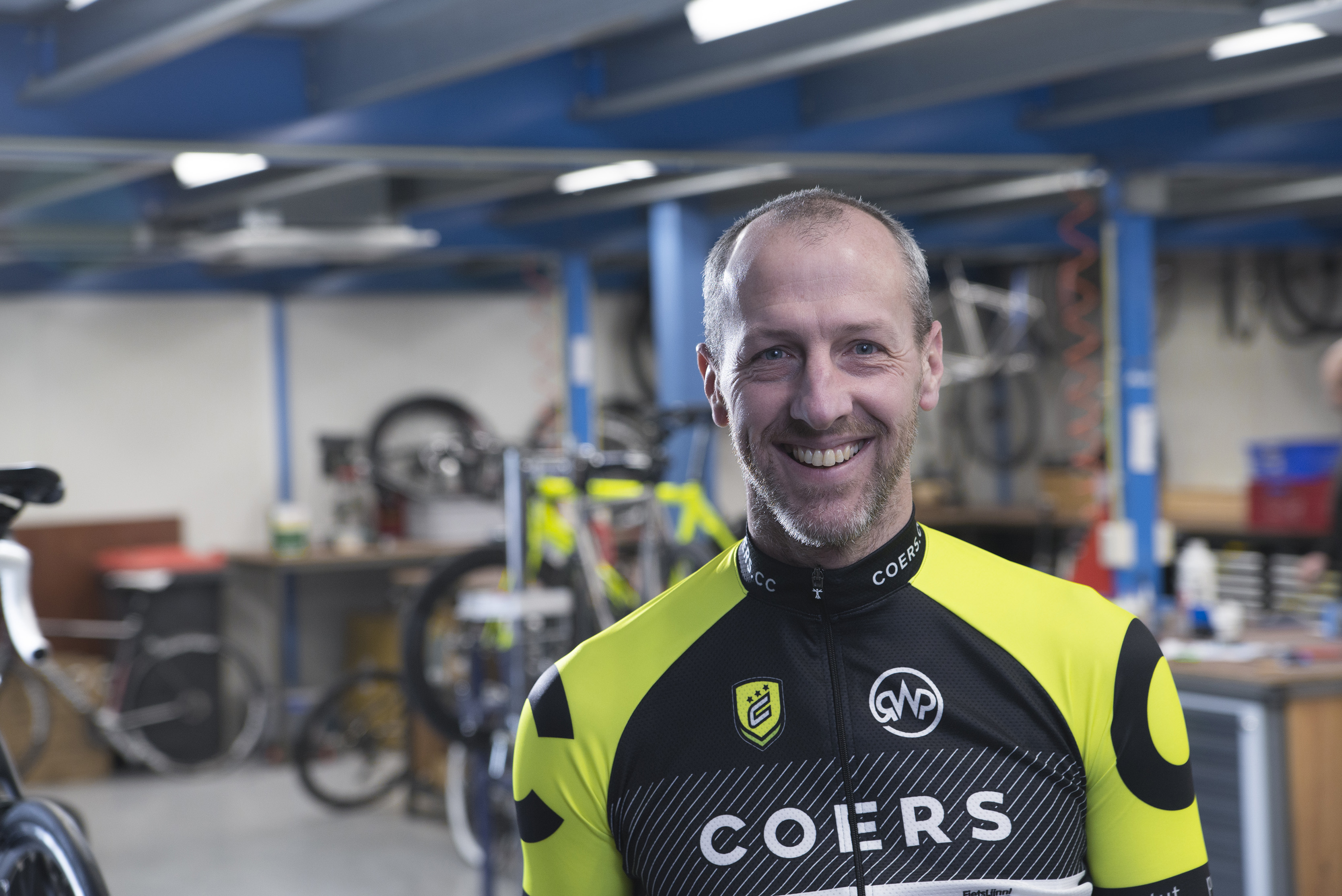 Foto ploegenvoorstelling TEAM COERS 2016